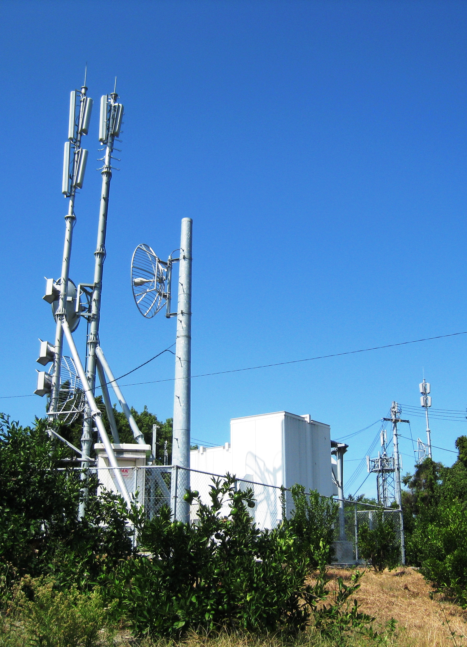 香川県坂出市雄山にある坂出東テレビジョン中継局の全景。左手前は在高3社（NHK、RNC、KSB）で、一番右奥は在岡2社（RSK、OHK）の送信施設。右から2番目は携帯電話会社（ソフトバンク）の基地局。